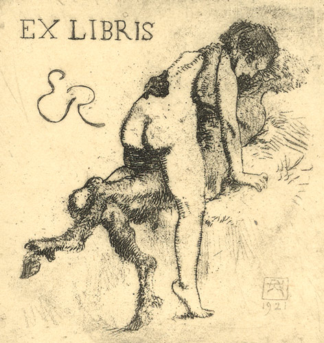 Armand Rassenfosse - Ex Libris E R. (Nackte Frau besteigt einen Satyr). Radierung, in der Platte monogrammiert und datiert, 1921